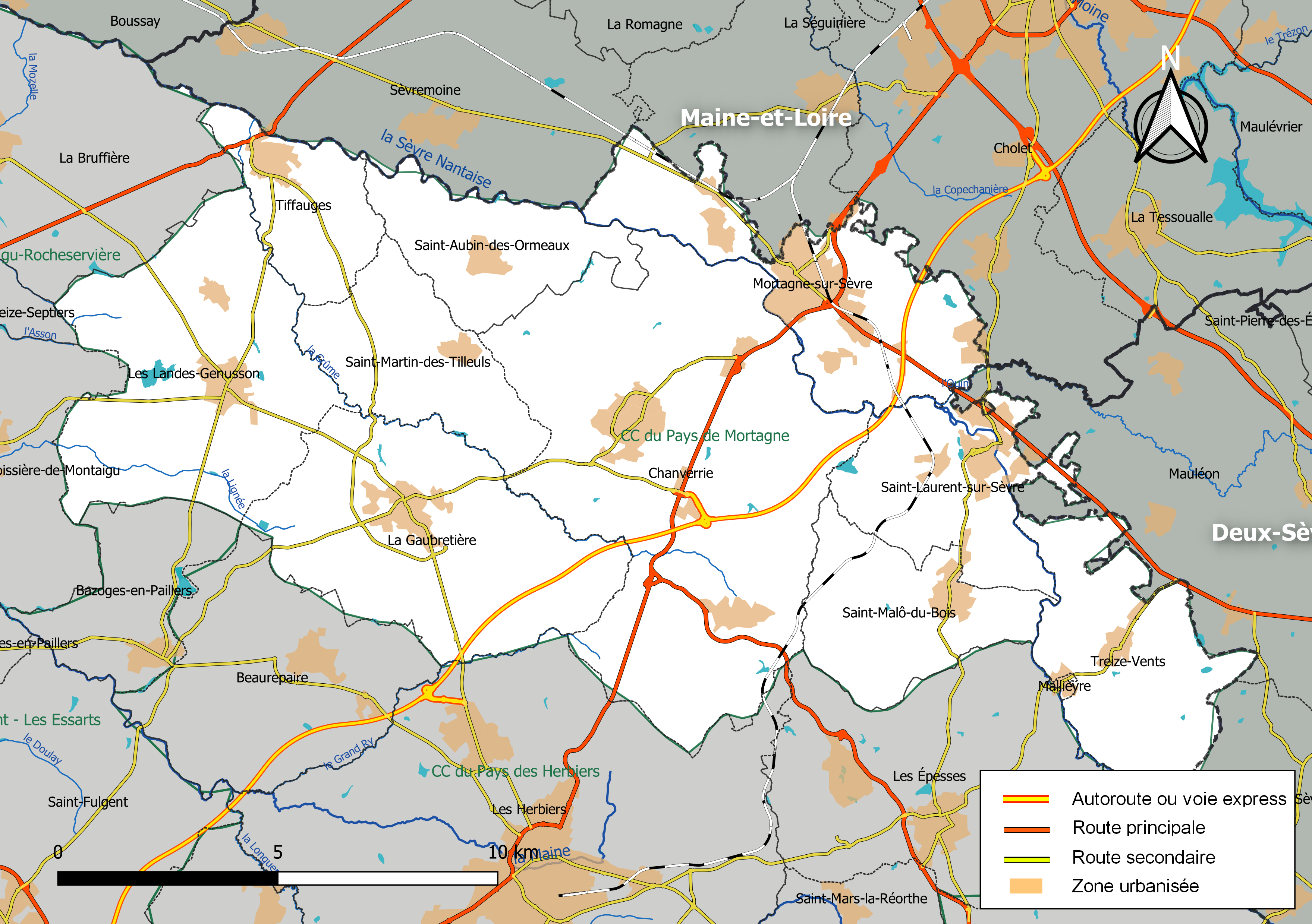 Carte géographique de la Communauté de communes du Pays-de-Mortagne, département de la Vendée, France. Composition au 1er janvier 2019.